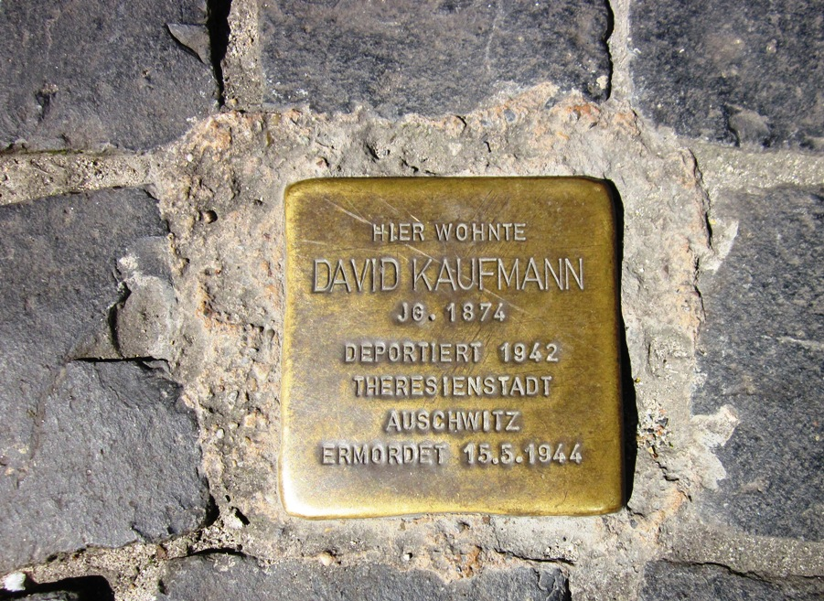 Stolperstein der ersten Verlegung in Eschweiler in Nordrhein-Westfalen; Position: Ecke Grabenstraße / Hospitalgasse in der Fußgängerzone